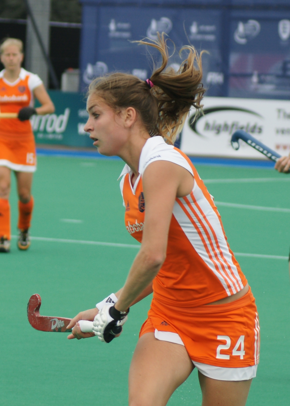 Eva de Goede